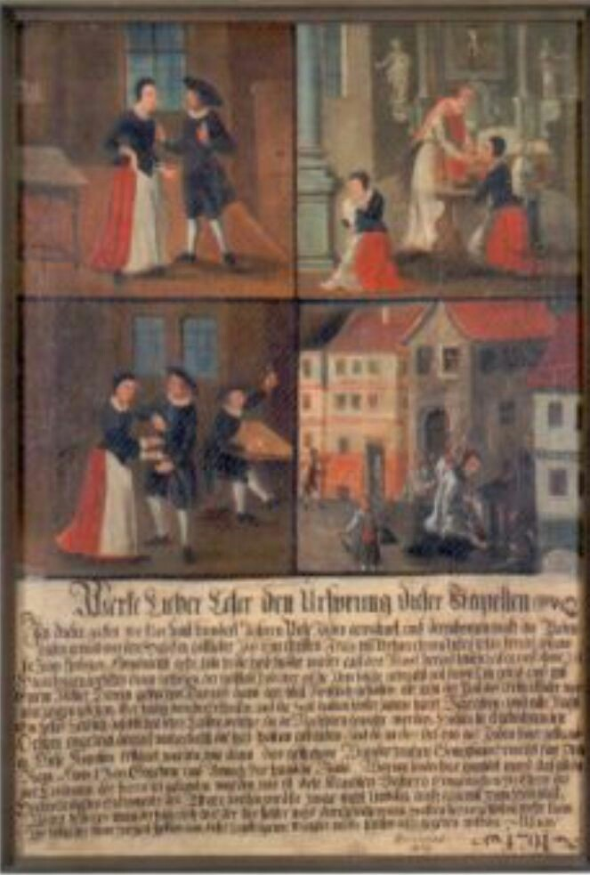 Die Blutskapelle (auch Kapelle zum heiligen Grab) in Lauda. Votivbild (neu)